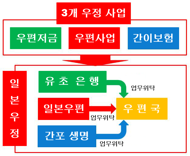 File:Postal service privatization of Japan.jpg를 국문판으로 개작, 업로드일자와 제작일자 동일, 만든이 사용자 천어, 일본어판 원작자 User:Genppy